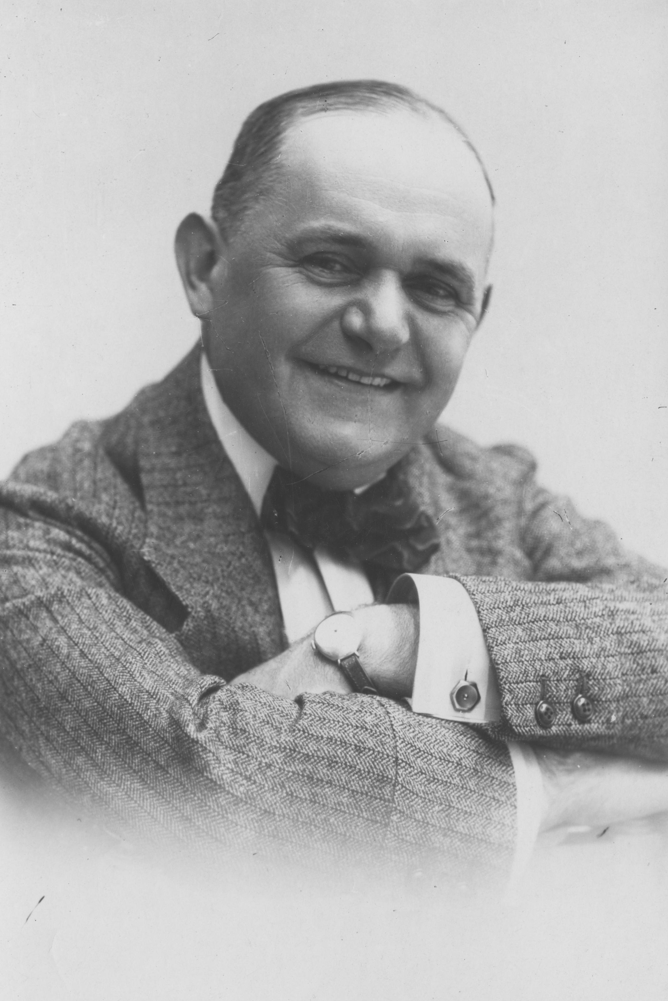 Polski aktor Antoni Fertner.